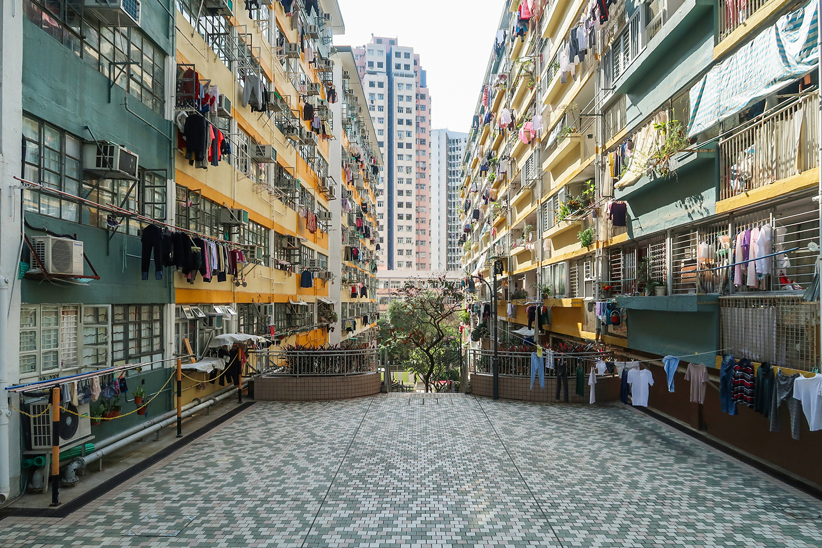 Ming Wah Dai Ha